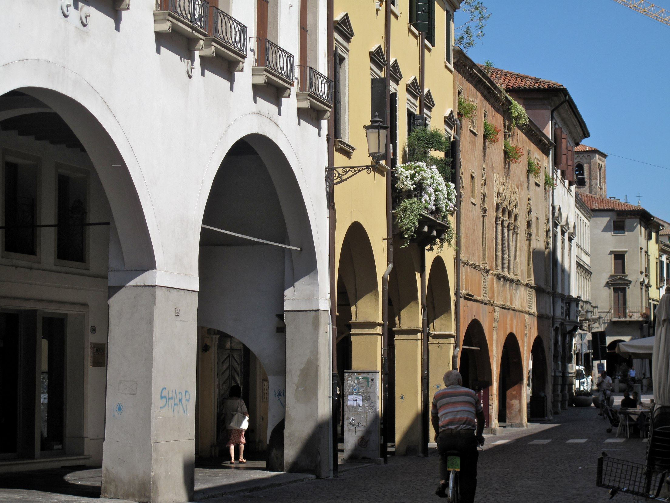 Padova juil 09 205